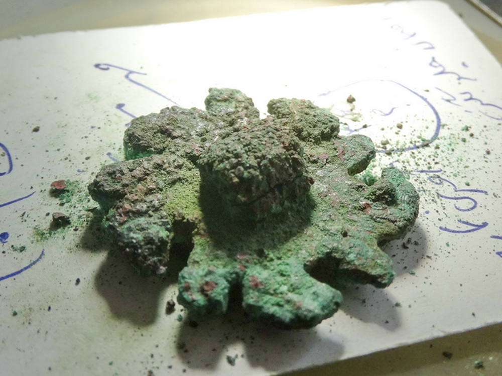 مهر باستانی 5000 ساله شهر سوخته